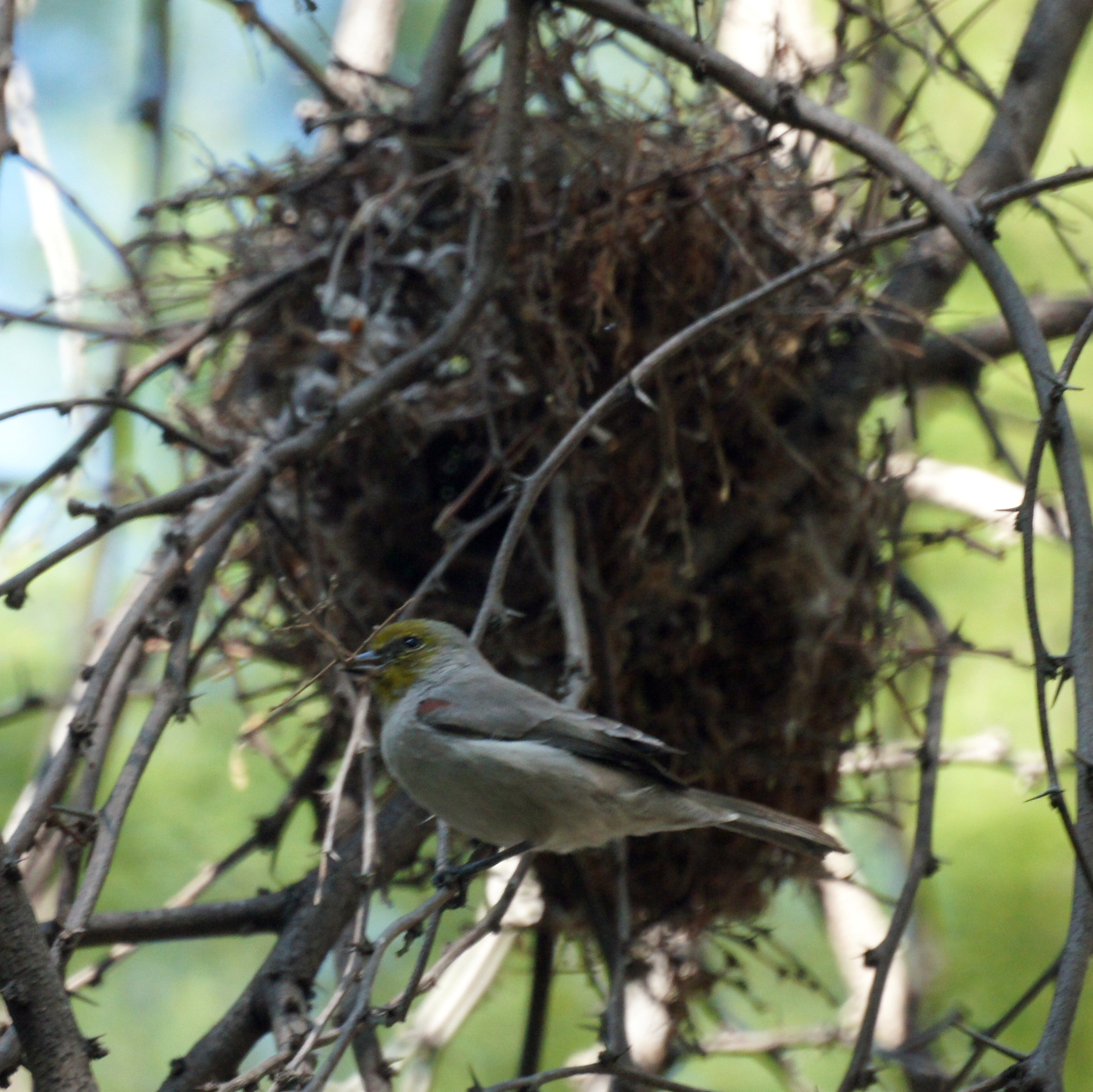 UCR Botanic Gardens